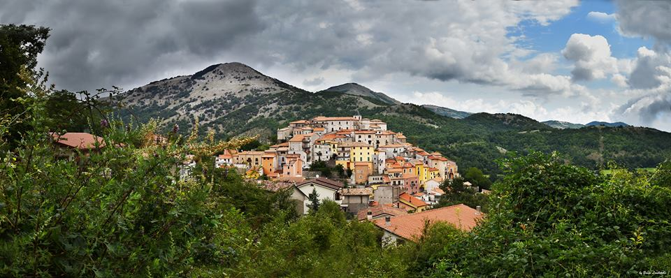 Veduta di Acquafondata (Fr)